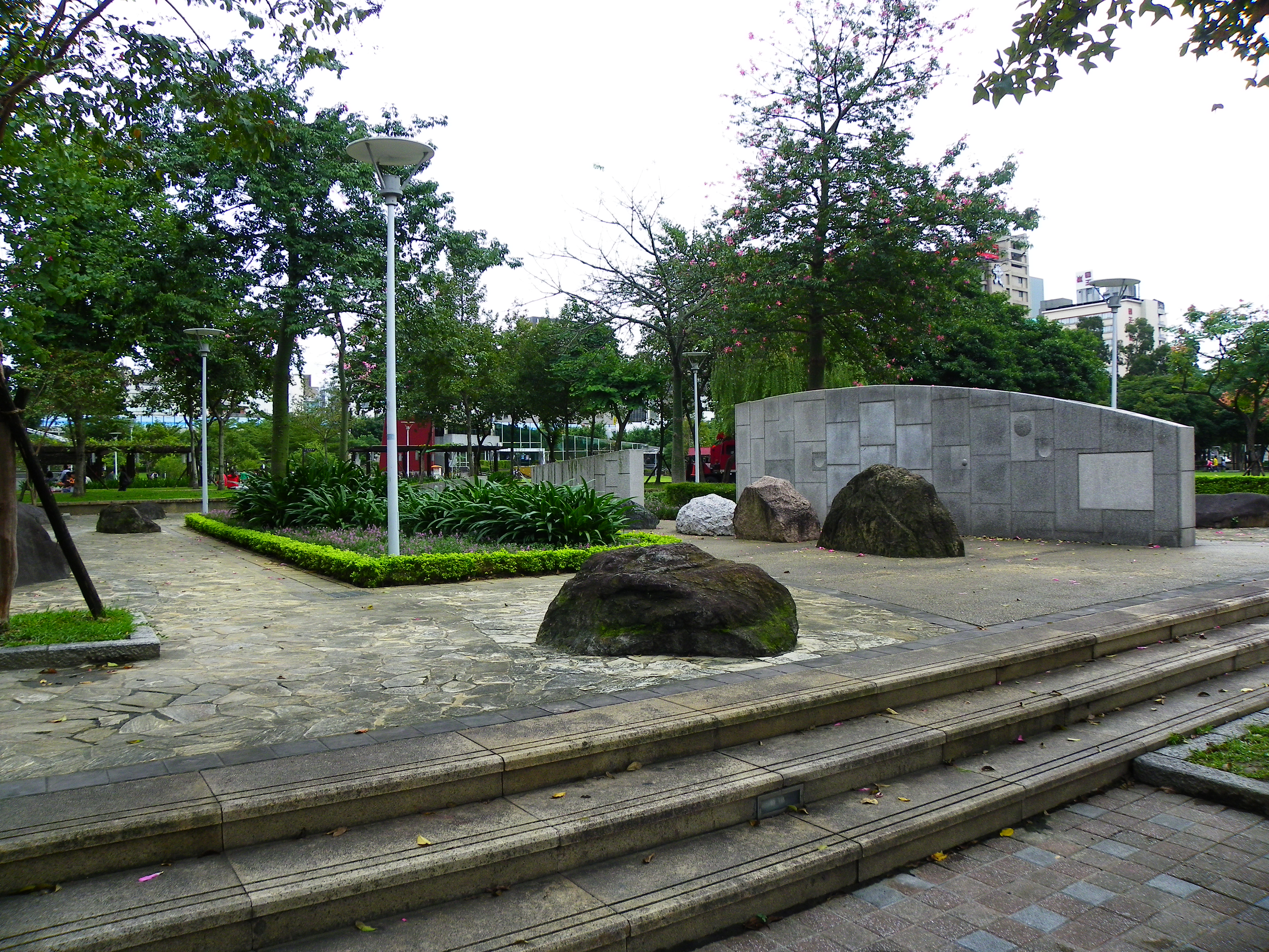 林森公園西北角的景石花園。